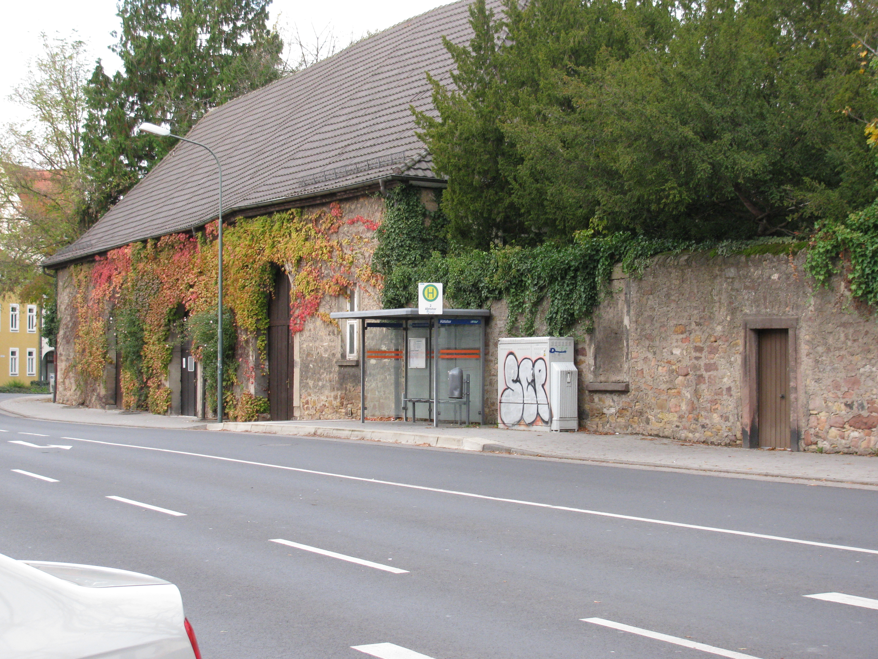 die Bushaltestelle Abtstor in der Straße Abtstor in Fulda für die Fahrtrichtung Norden